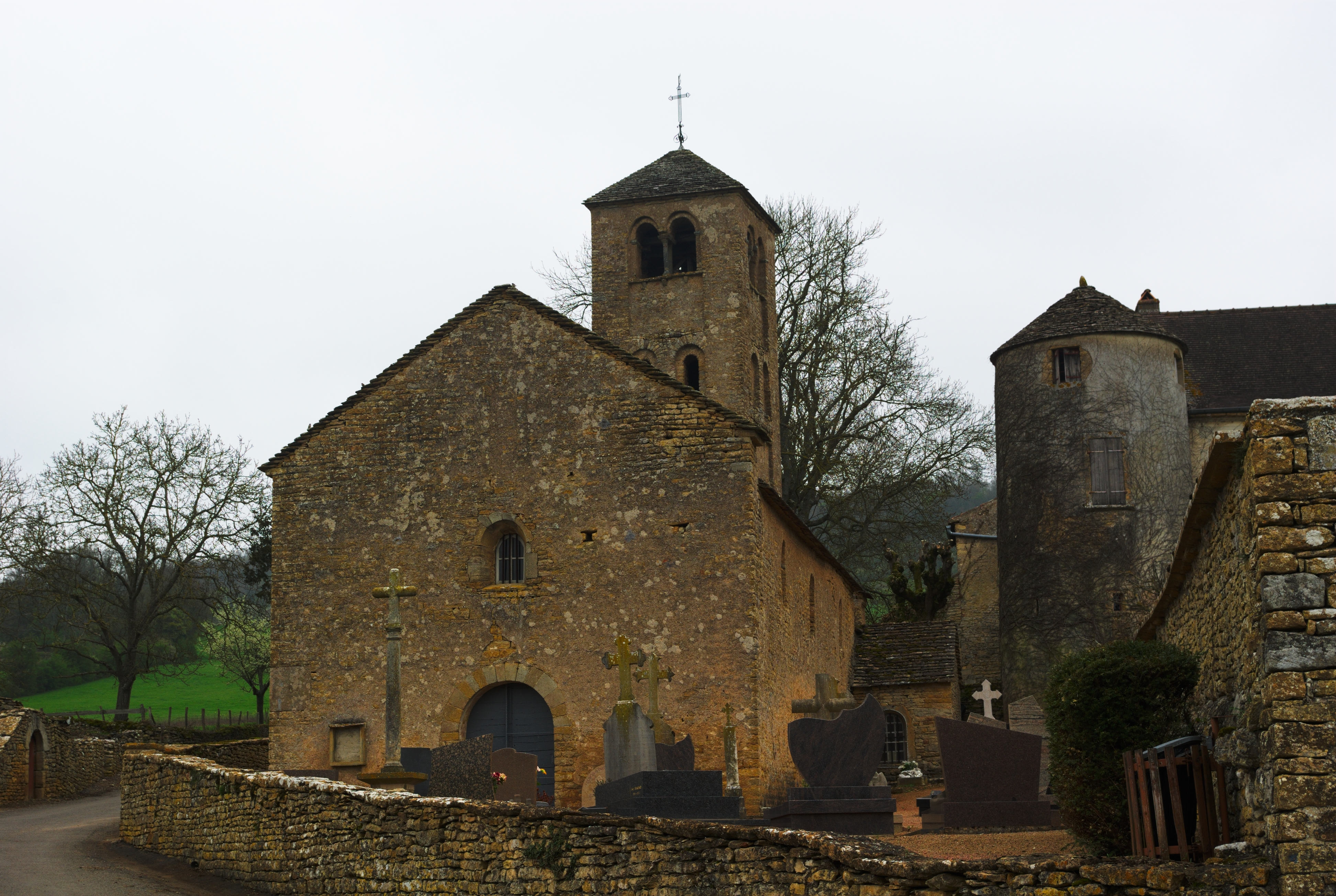 Église Saint-Denis de Massy